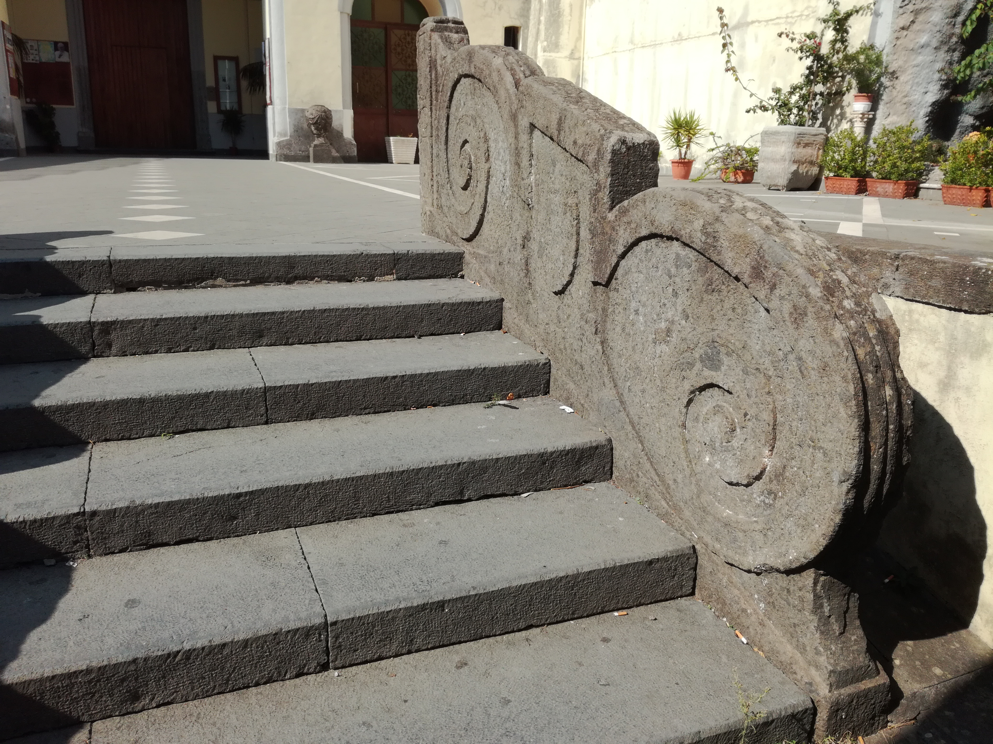 Scala in piperno del monastero di Sant'Eframo Vecchio